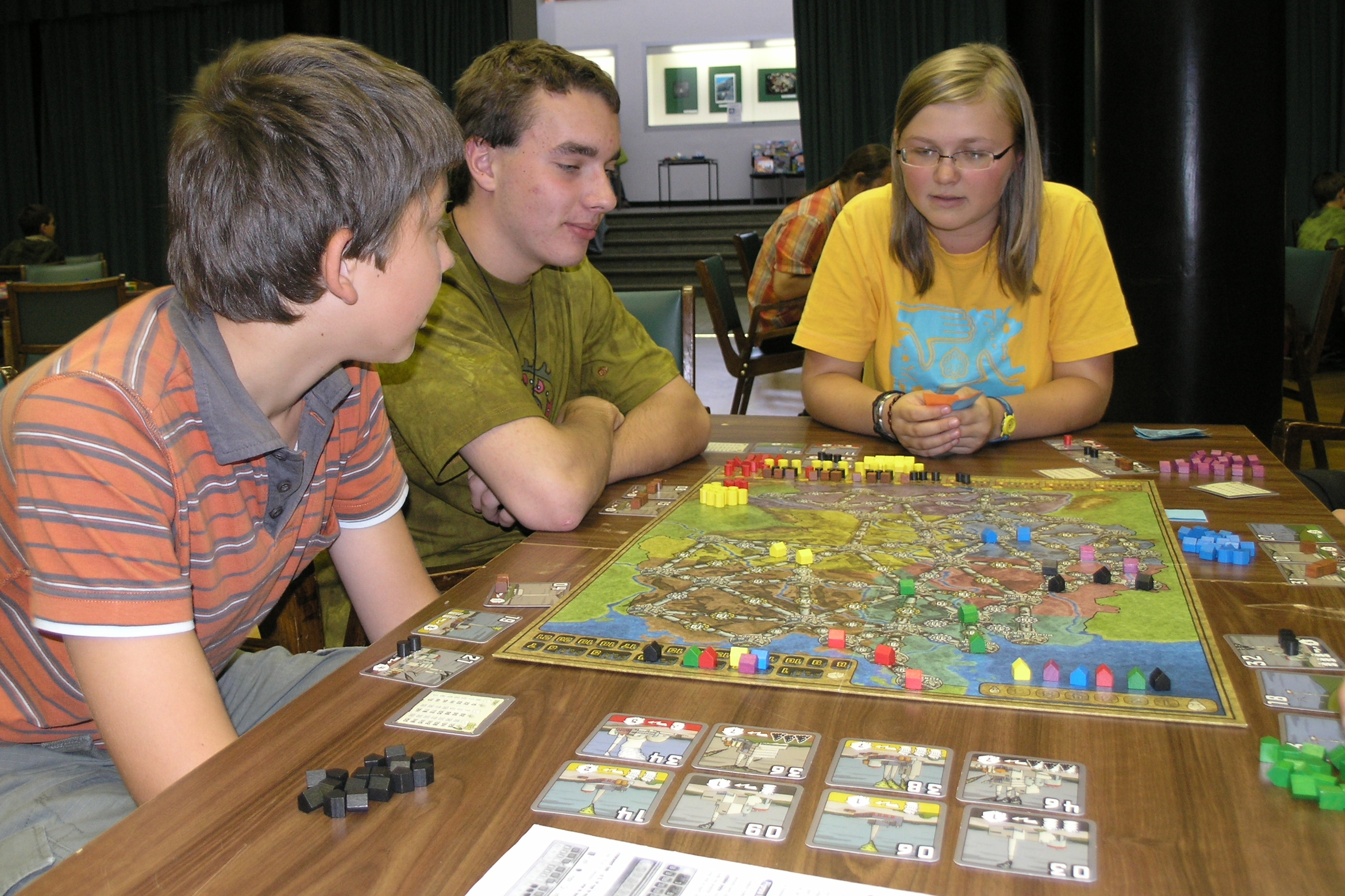 Hry a hlavolamy 2008 - festival her a hlavolamů v Praze, Holešovicích